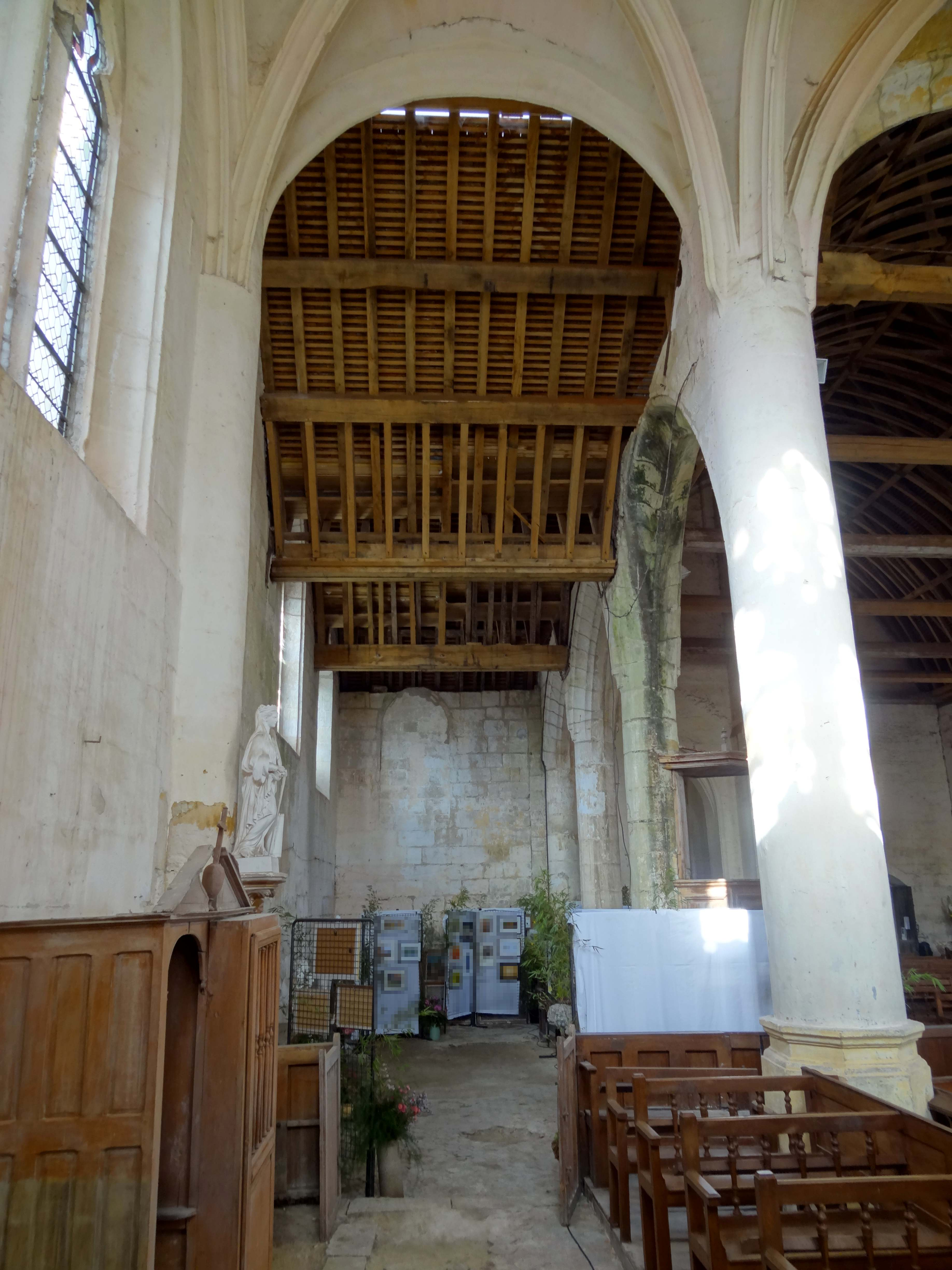 Intérieur de l'église - voir titre.